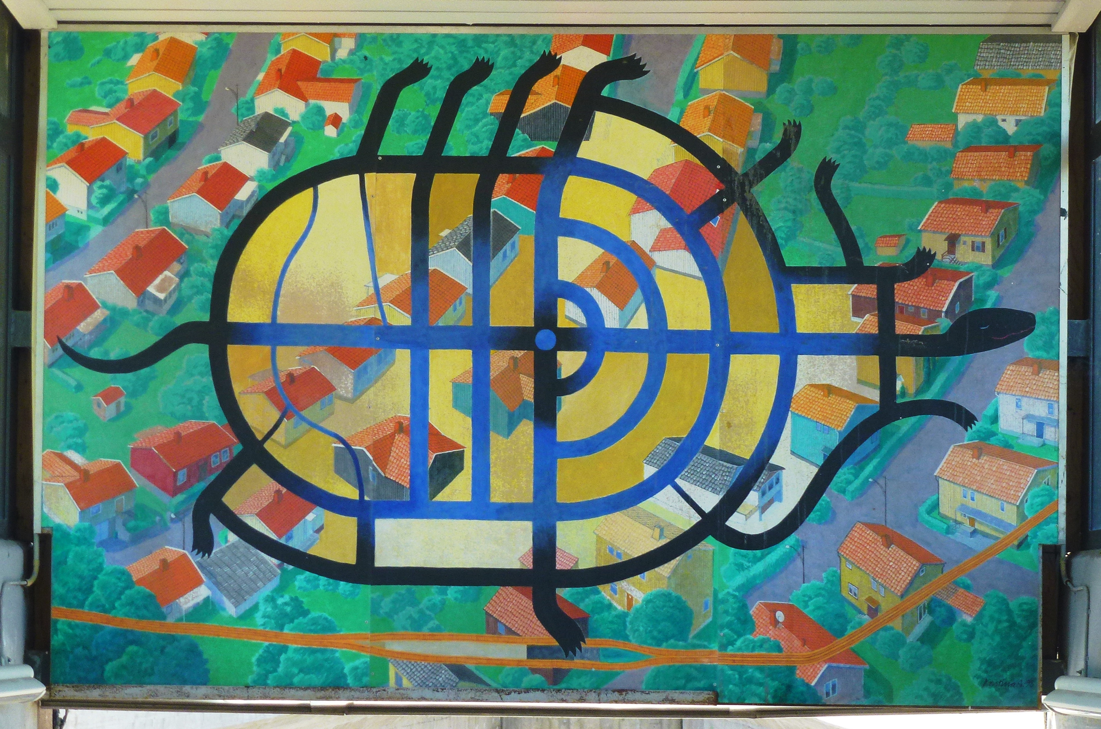 Tallkrogens tunnelbanestation. Konstverket "Tallkrogen" av Kristina Anshelm